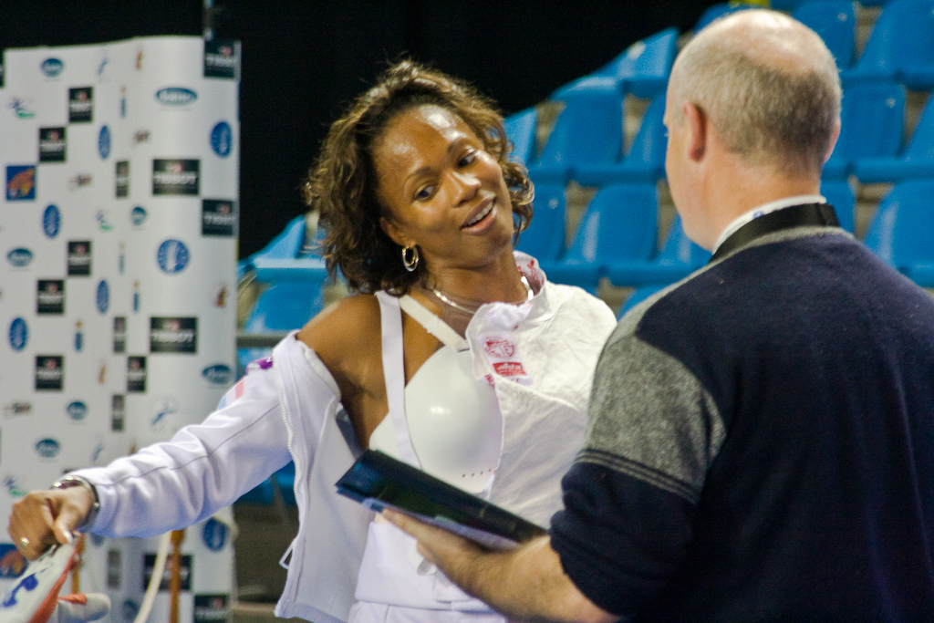 Laura Flessel après un assaut aux Championnats d'Europe d'escrime, le 6 juillet 2007.